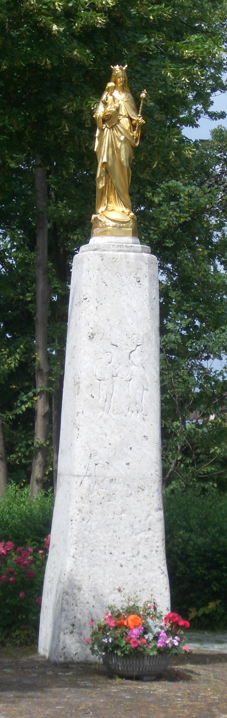 Säule mit vergoldeter Marien-Statue in Buchloe, früher mit Marien-Brunnen